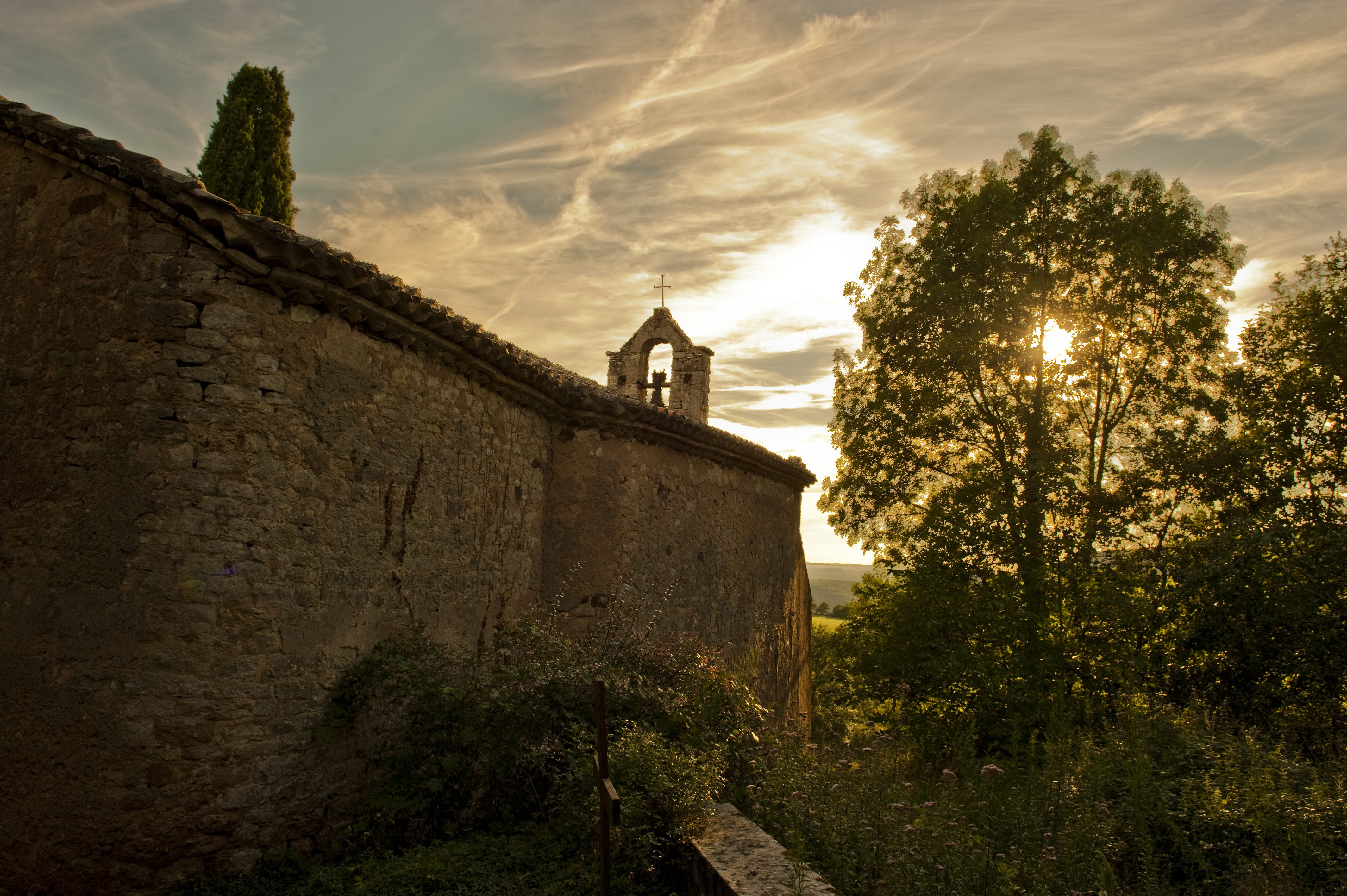 chapelle près de Gaillac